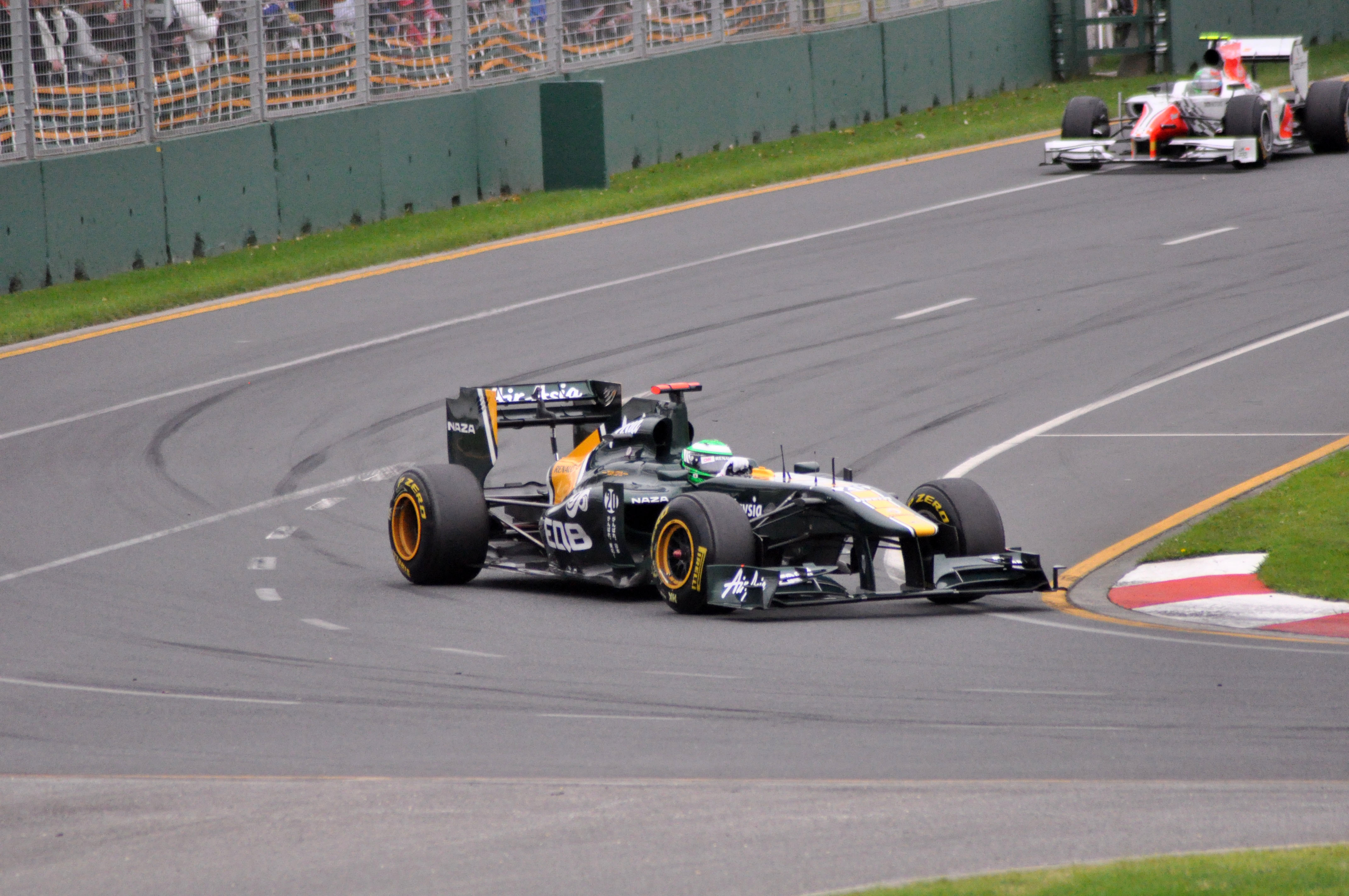 Aus F1 GP Weekend 2011 82